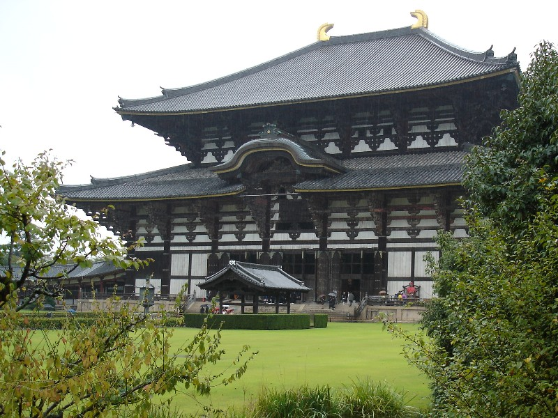 Der Todai-ji in Nara